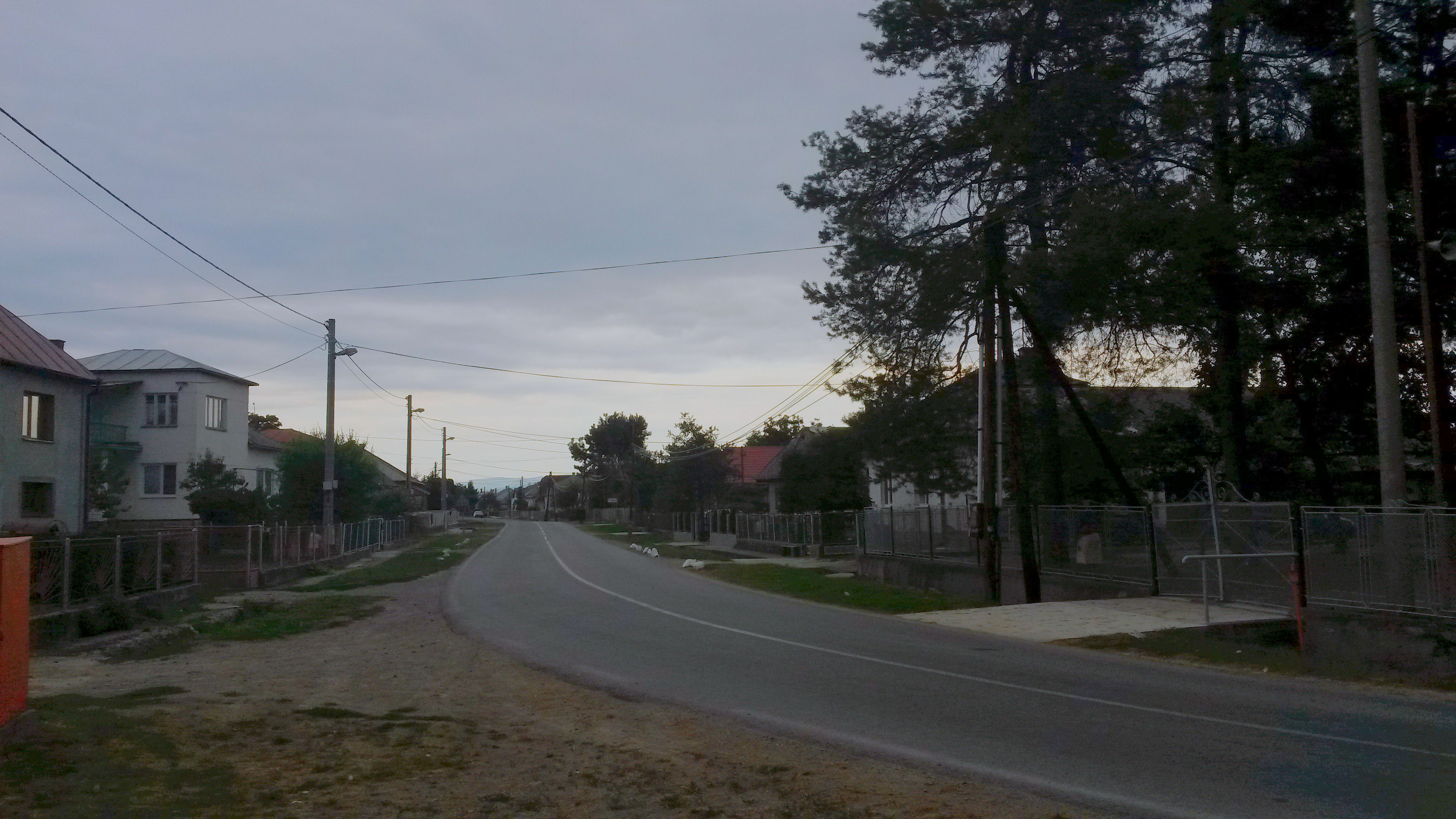 Kristy